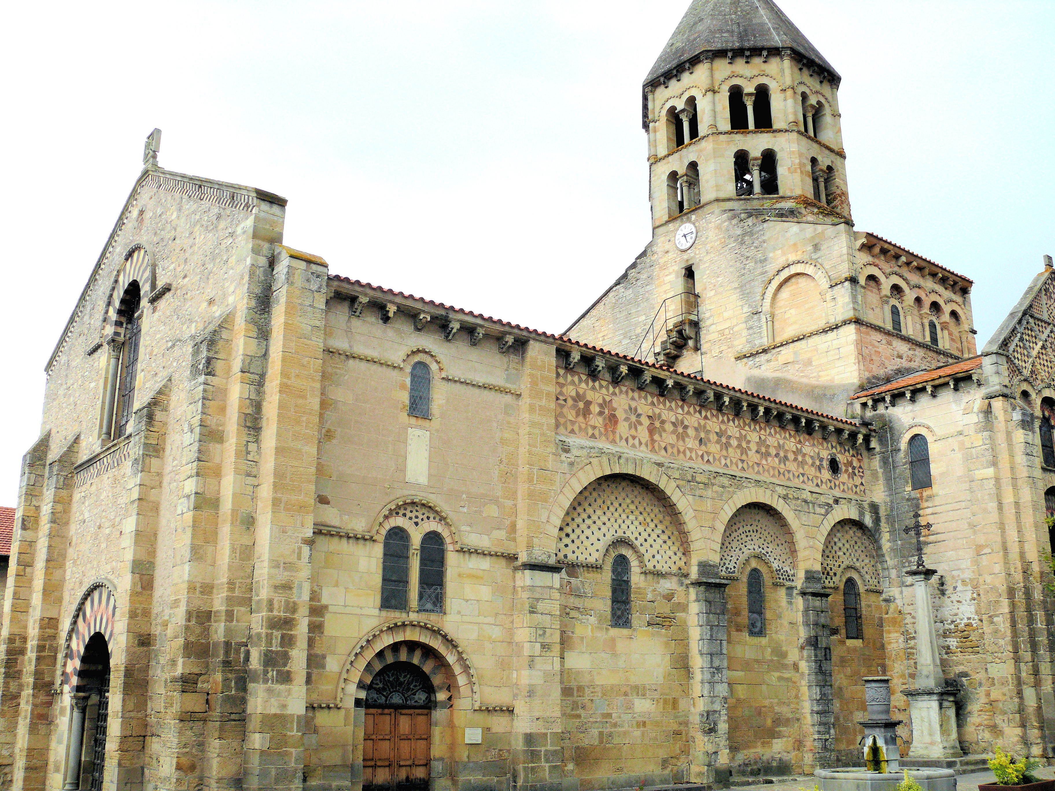 Église Saint-Julien de Chauriat